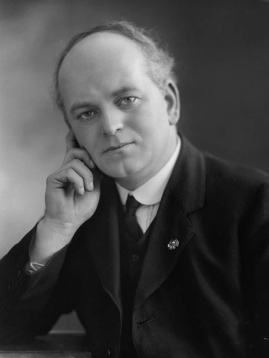 Frederick Owen Roberts